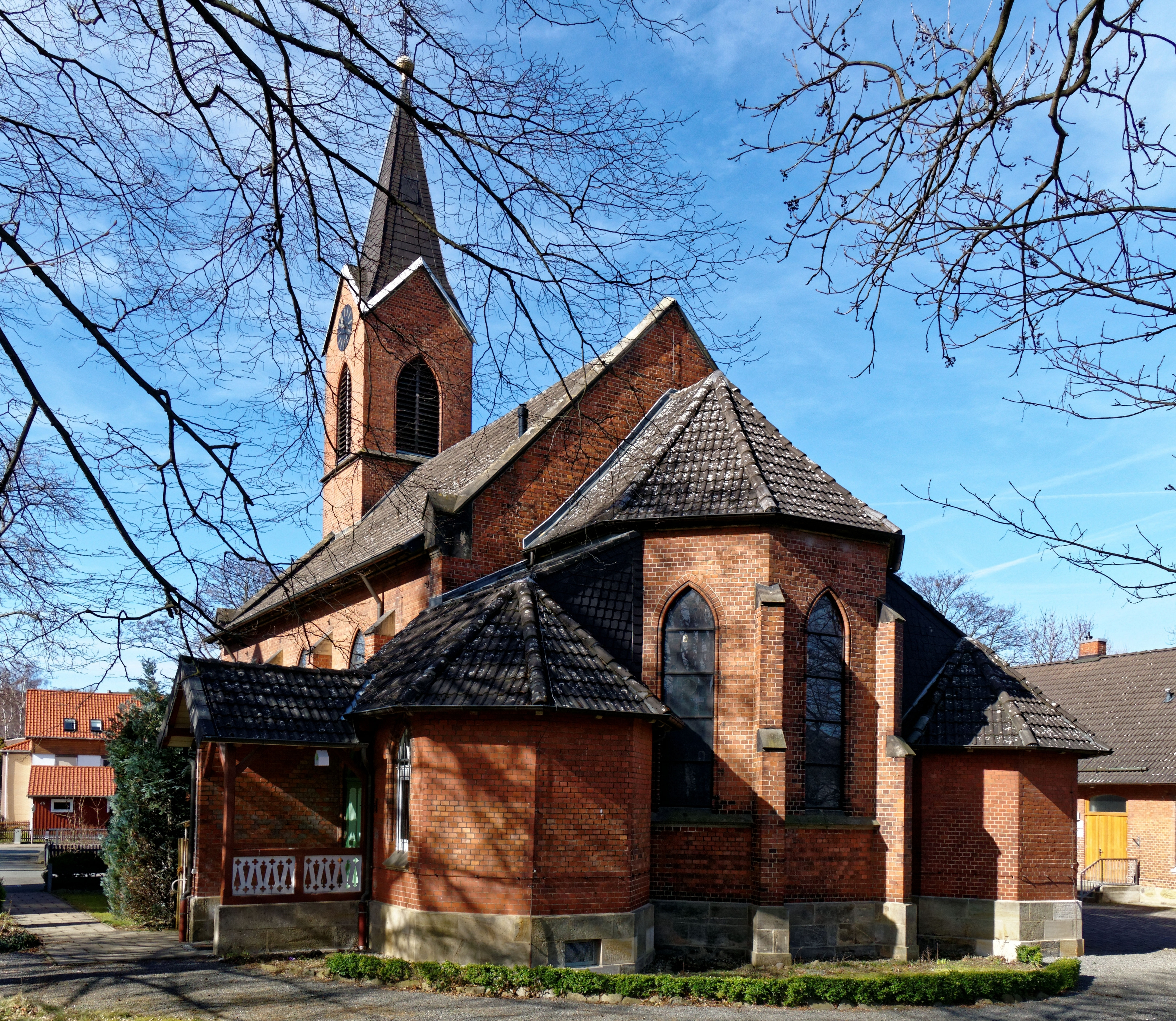 Ostseite der kath. St.-Gregor-Kirche in Bündheim